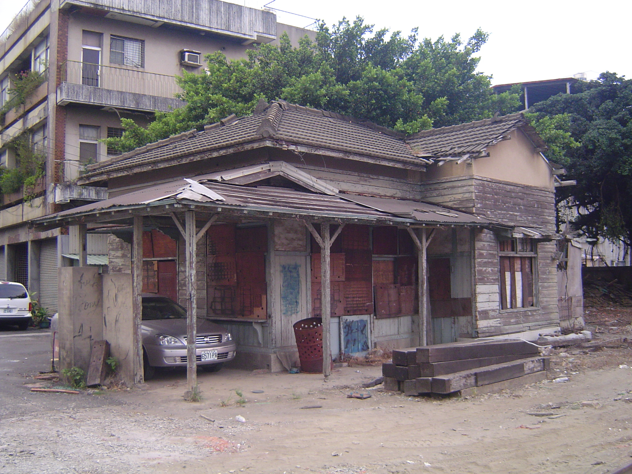 高雄市三民區原臺鐵三塊厝車站。